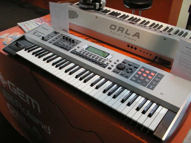 Roland Fantom Xa на выставочном стенде